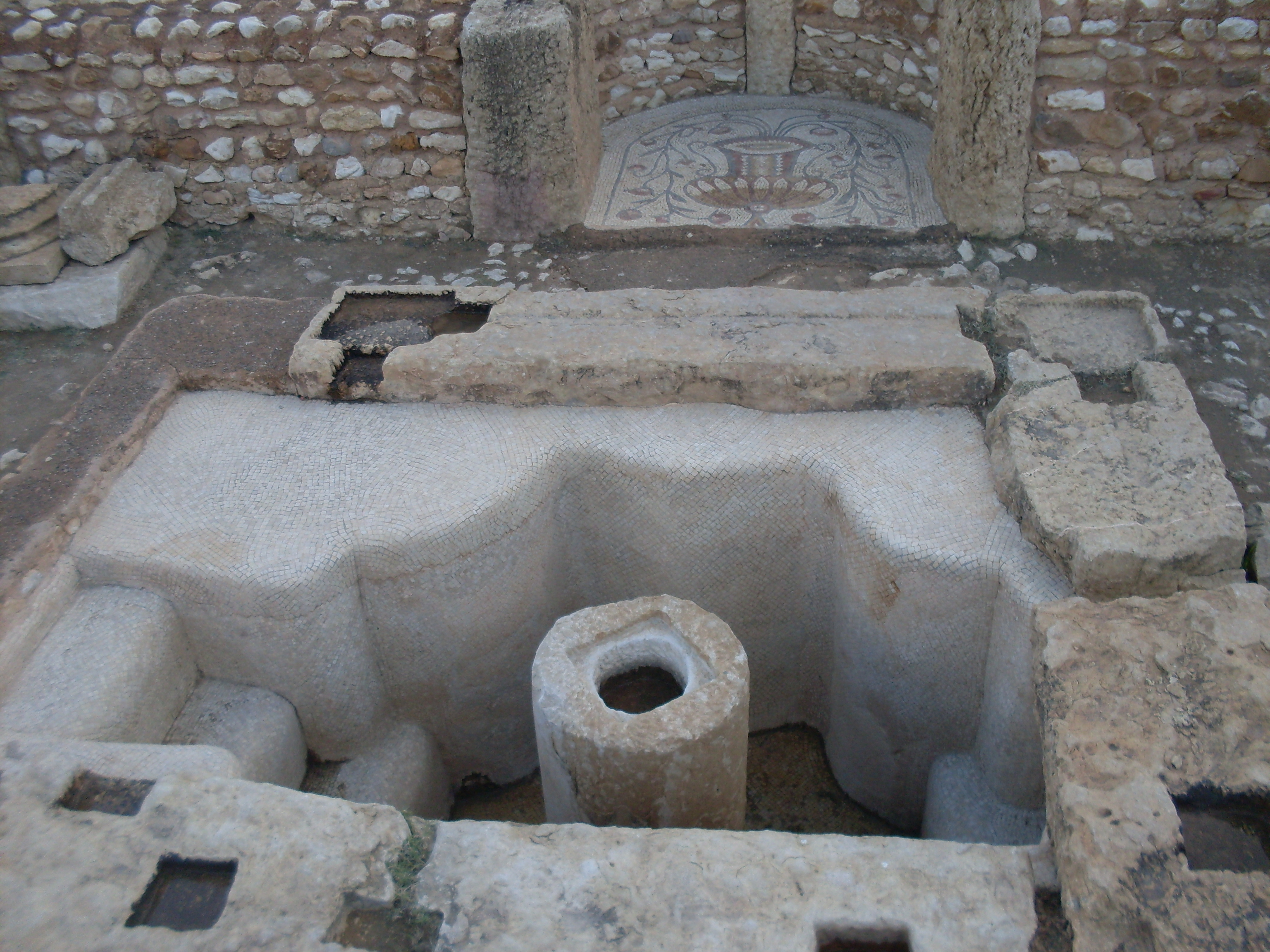 Baptistère Sbeitla